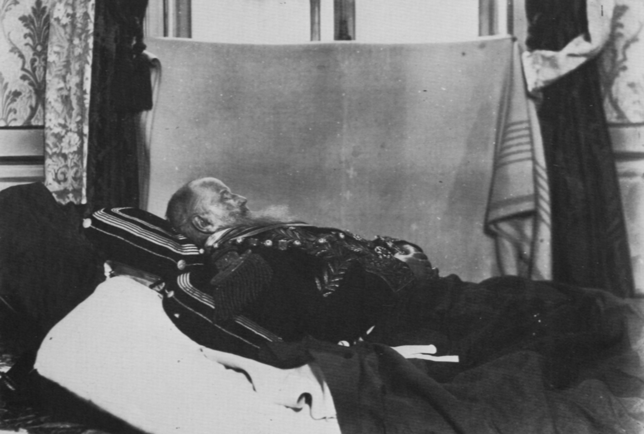 Atelier Nadar: Pedro II. (1825-1891), König von Brasilien, auf seinem Totenbett in Paris